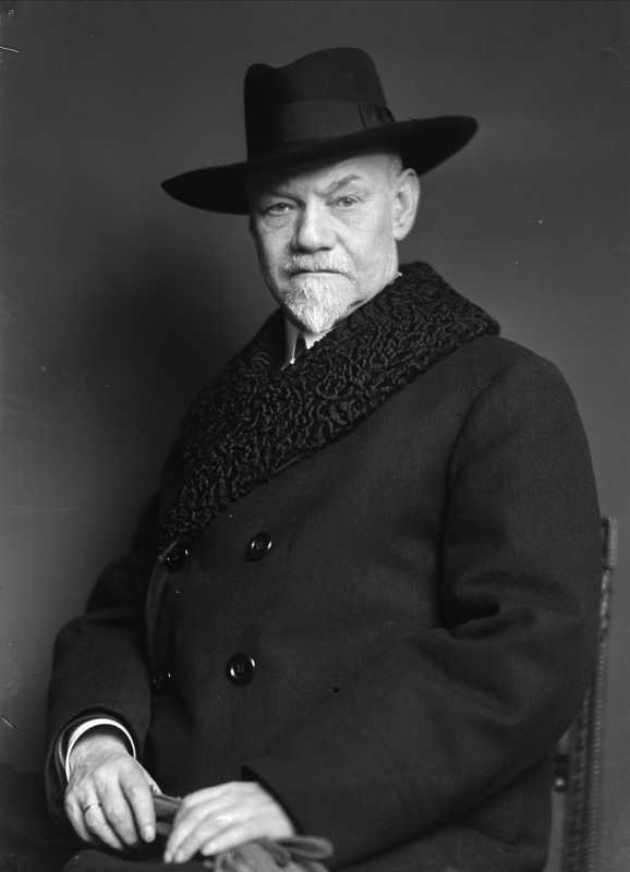 Jens Thiis, portrett, mann, kunsthistoriker, museumsdirektør, sittende halvfigur, hatt.